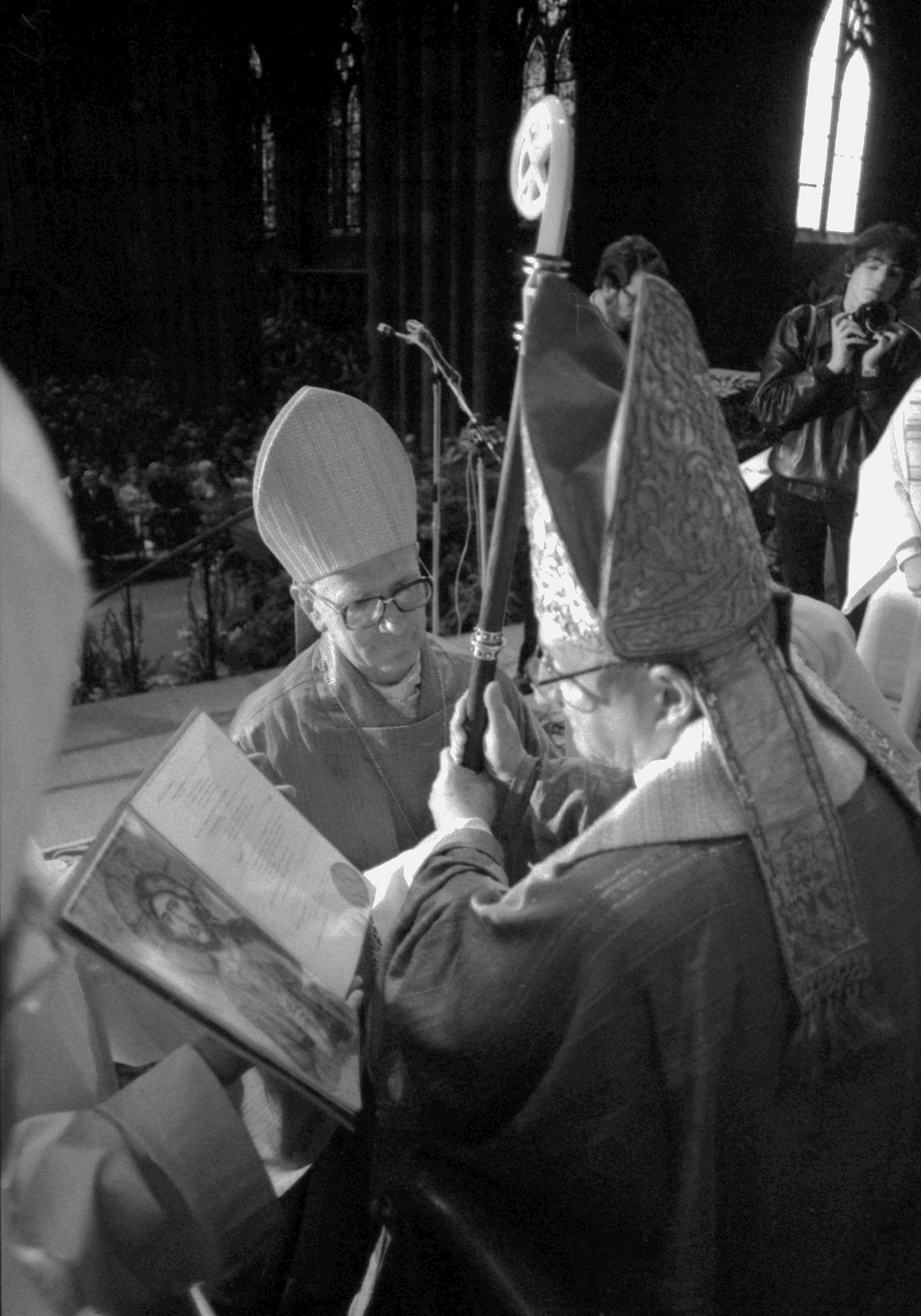 Ordination épiscopale de Mgr Roger Heckel par Mgr Léon-Arthur Elchinger en la cathédrale Notre-Dame de Strasbourg le 15 juin 1980